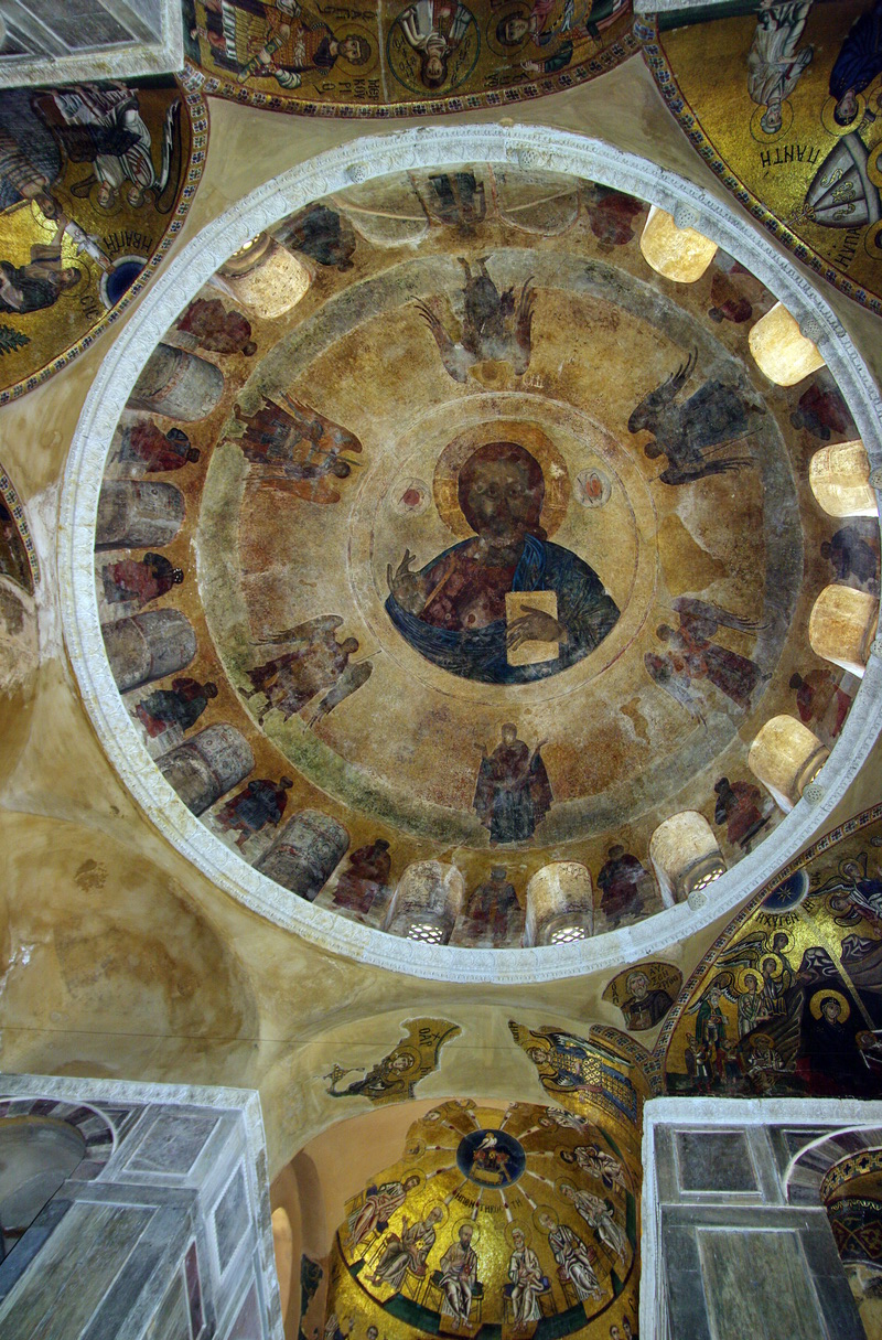 Kuppel Katholikon Kloster Osios Loukas